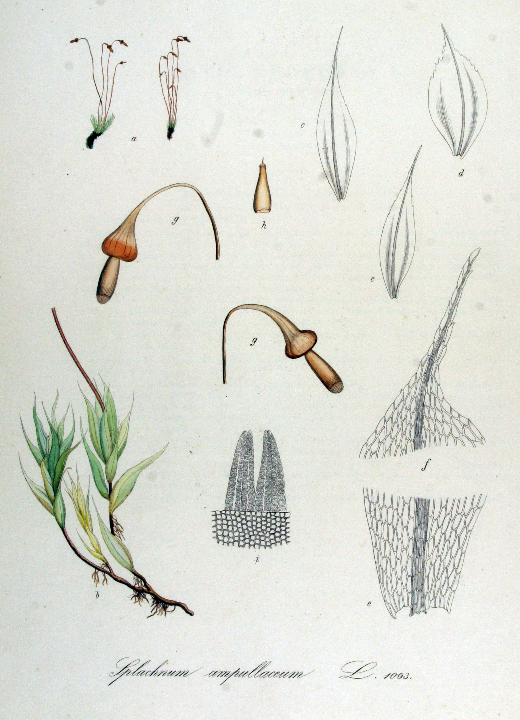 Splachnum ampullaceum Hedw.